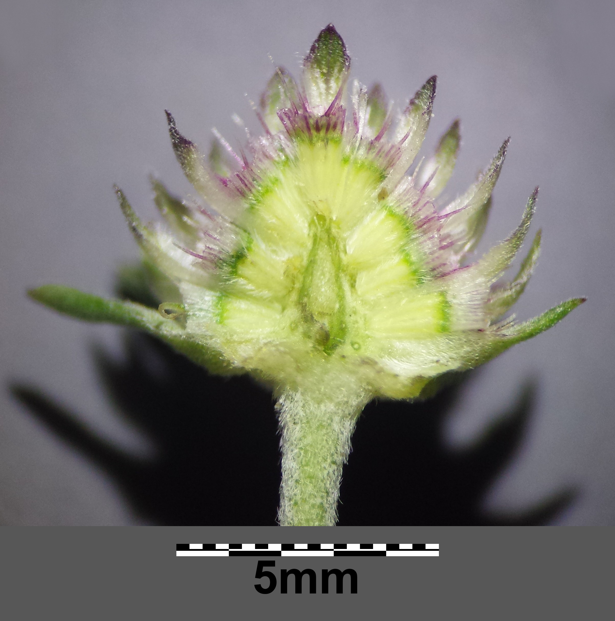 Köpfchen, vordere Früchte entfernt Taxonym: Scabiosa canescens ss Fischer et al. EfÖLS 2008 ISBN 978-3-85474-187-9 Fundort: Lössberg westlich von Großebersdorf, Bezirk Mistelbach, Niederösterreich - ca. 200 m ü. A. Standort: Halbtrockenrasen